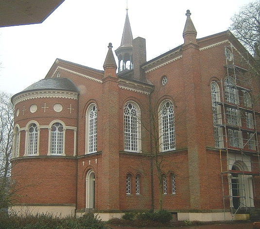 St. Magnus - Kirche in Esens, Backsteingotik, evangelisch.